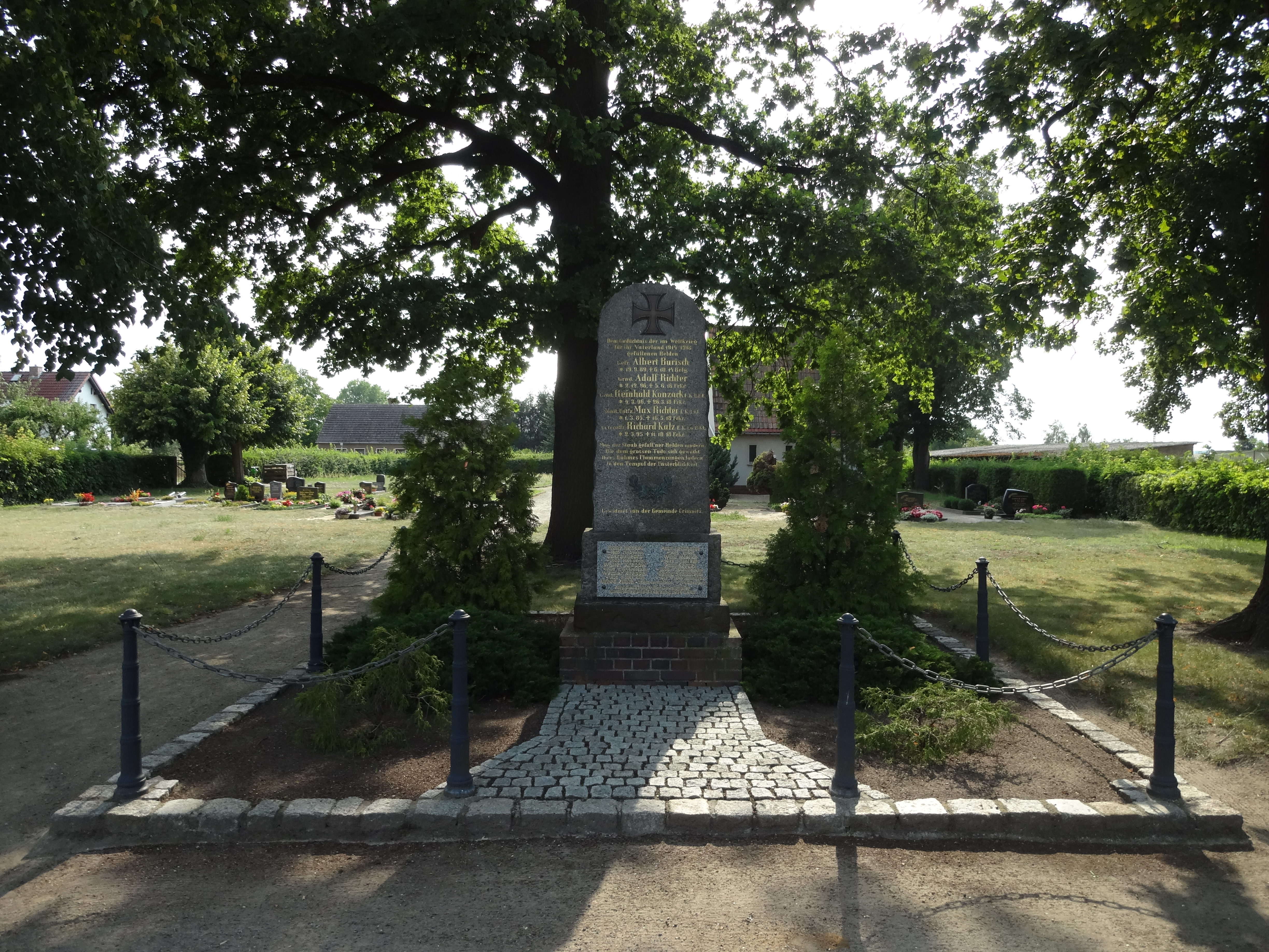 Gefallendenkmal Krimnitz